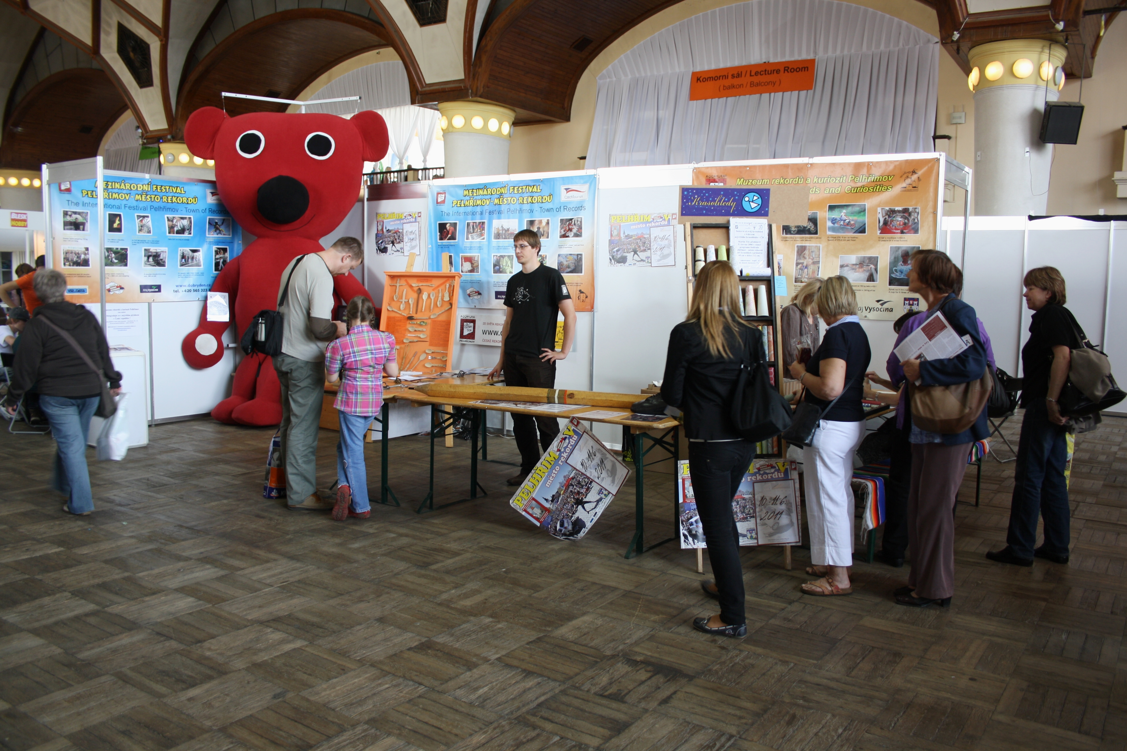 Pelhřimov, město rekordů na 17. mezinárodním knižním veletrhu Svět knihy v Praze Personality rights warningAlthough this work is freely licensed or in the public domain, the person(s) shown may have rights that legally restrict certain re-uses unless those depicted consent to such uses. In these cases, a model release or other evidence of consent could protect you from infringement claims.